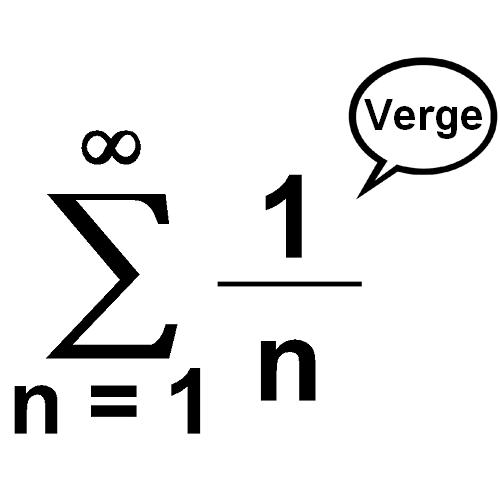 serie harmonique diverge